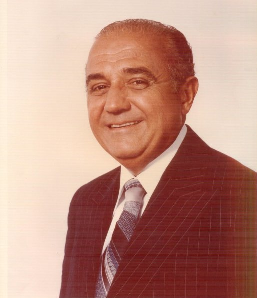 english